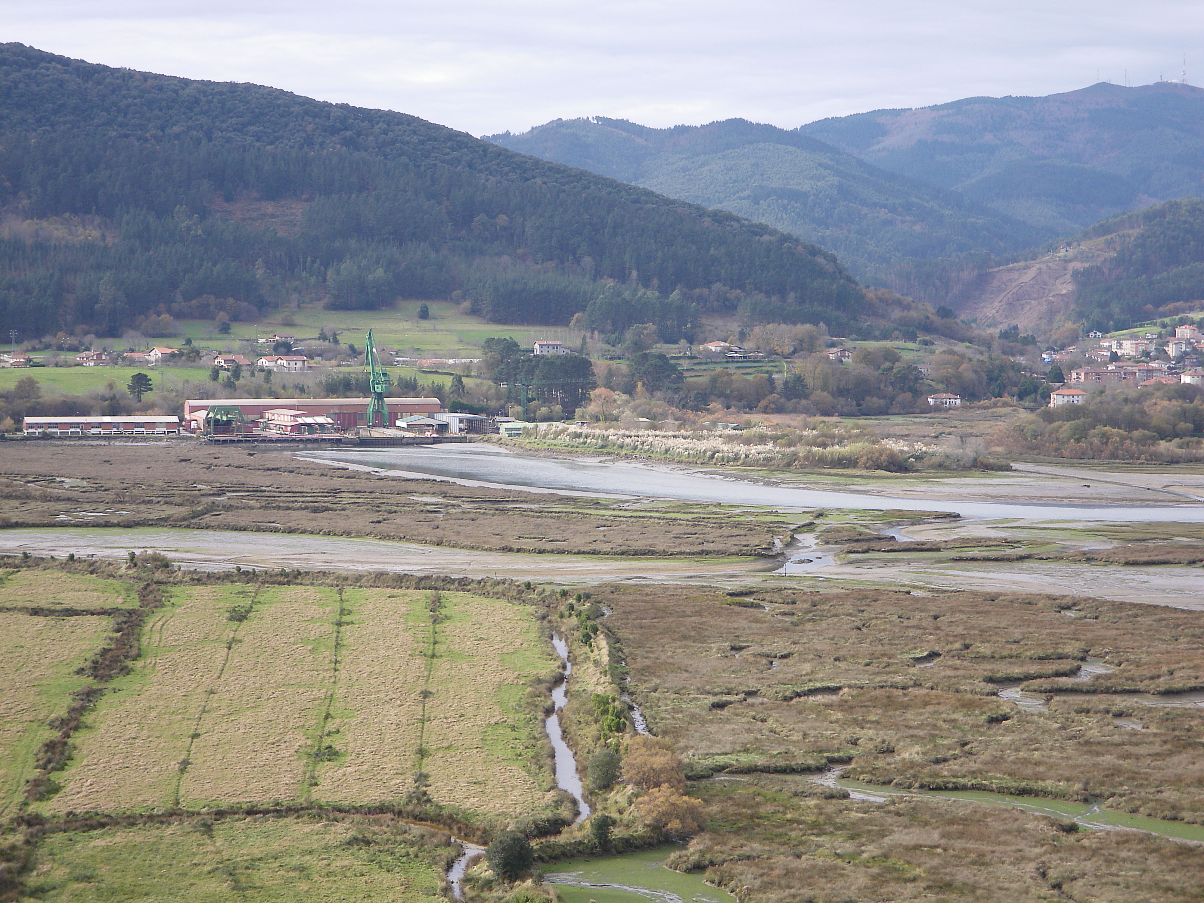 Urdaibaiko itsasadarra eta Murueta ontziola, Bizkaian.